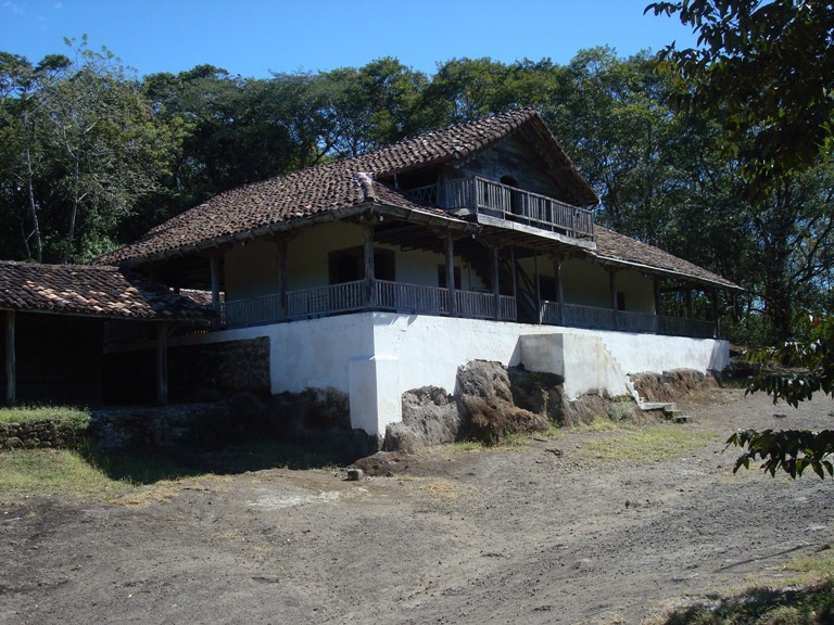 Casona de Santa Rosa en la Hacienda del mismo nombre, Guanacaste, Costa Rica.